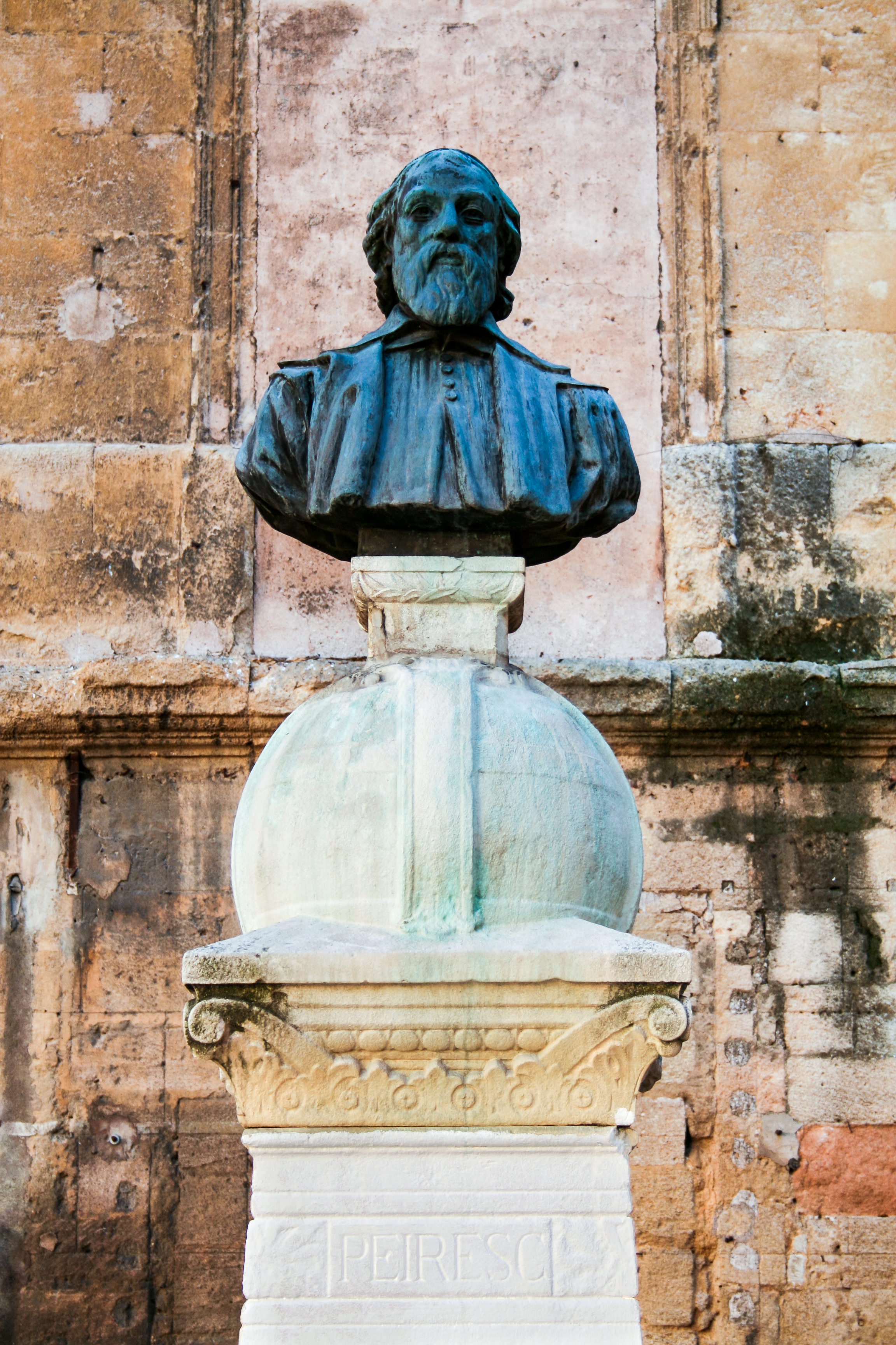 Buste de Nicolas-Claude Fabri de Peiresc situé place de l'Université à Aix-en-Provence (Bouches-du-Rhône, France)